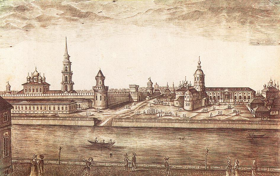 Изображение Тулы на гравюре 1807 года